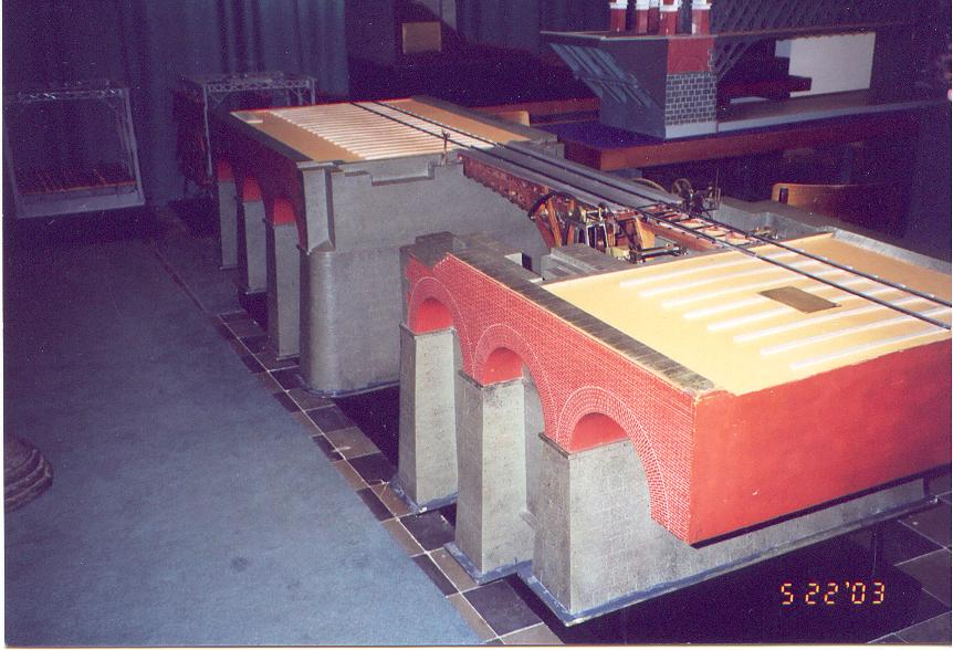 Модель разводной части железнодорожного моста через Волхов Санкт-Петербург-Московской железной дороги